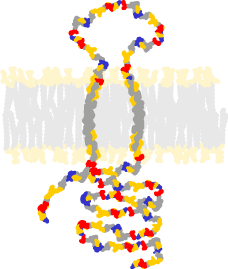 Recettore Sigma schematizzato